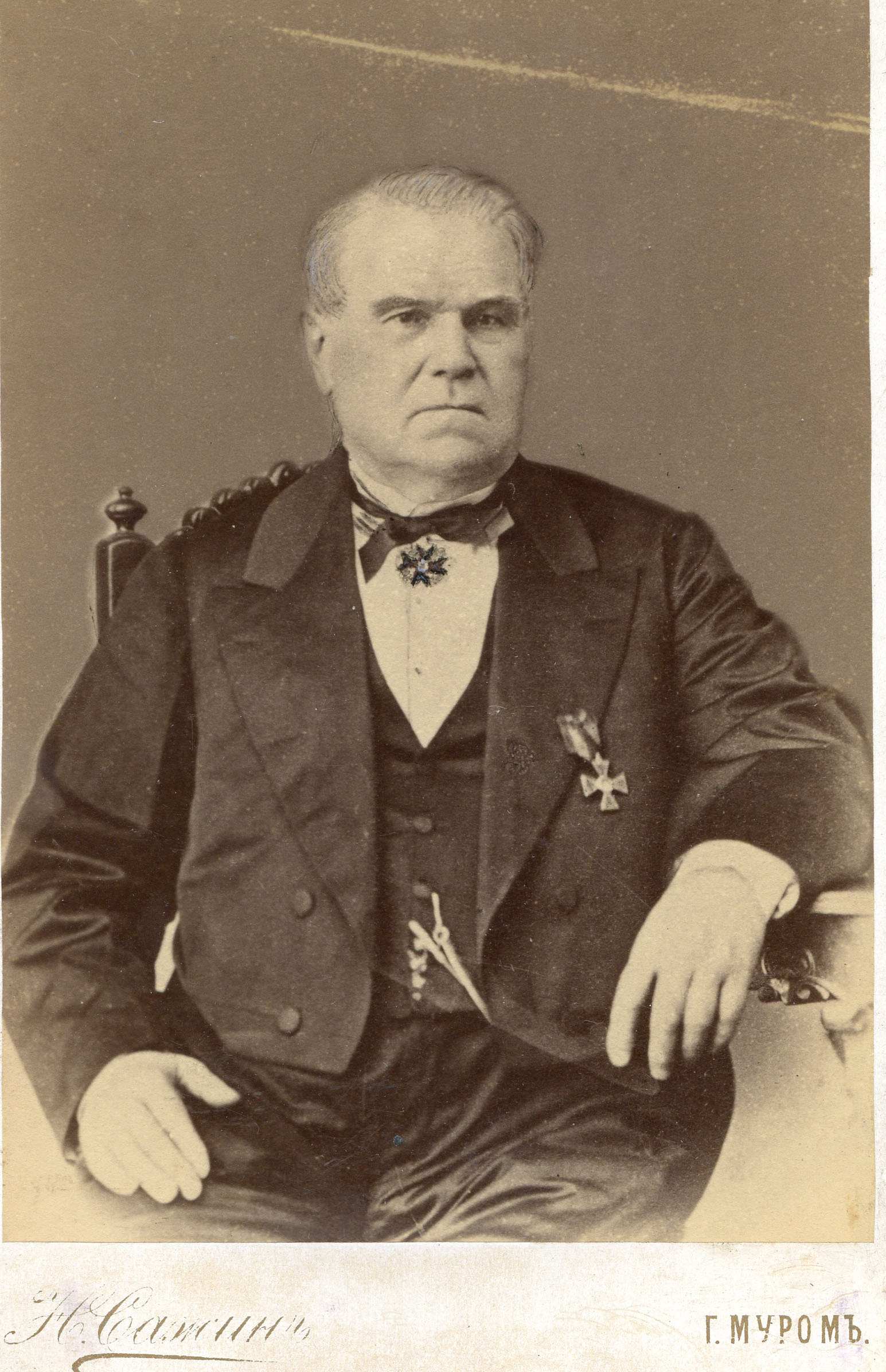 Портрет городского головы в 1863-1869 гг. купца А.В.Ермакова. Муром, 1860-е гг. Место хранения: Муромский музей